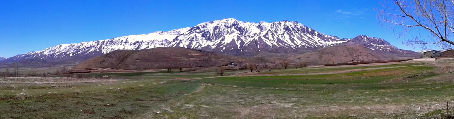 نمایی از مزارع، تپه ها و کوه های جنوب فریدون شهر از محله چوگولی